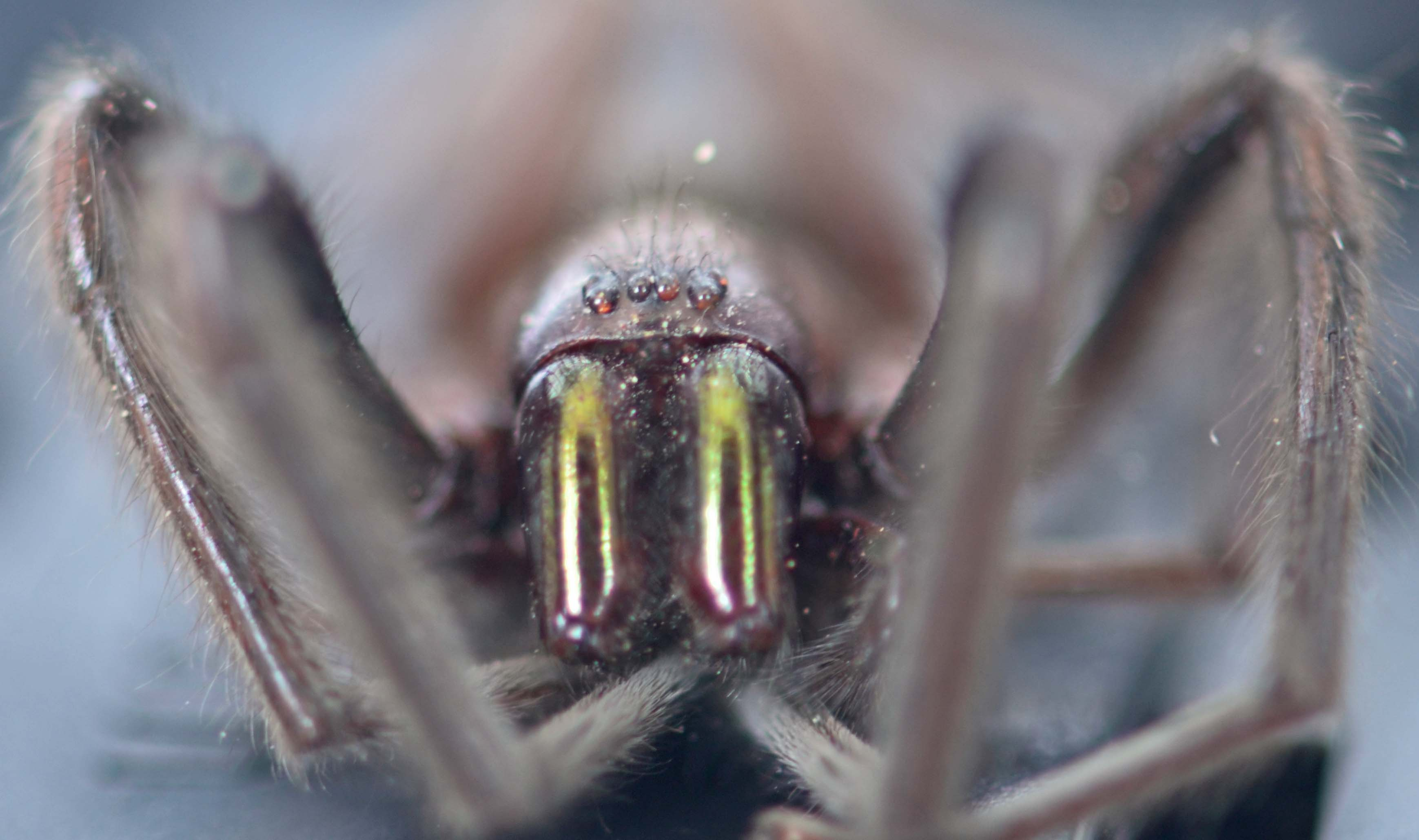 Détail des chélicères d'un cadavre d'araignée Segestria florentina trouvé à Morgat (Bretagne, France en juillet 2011)